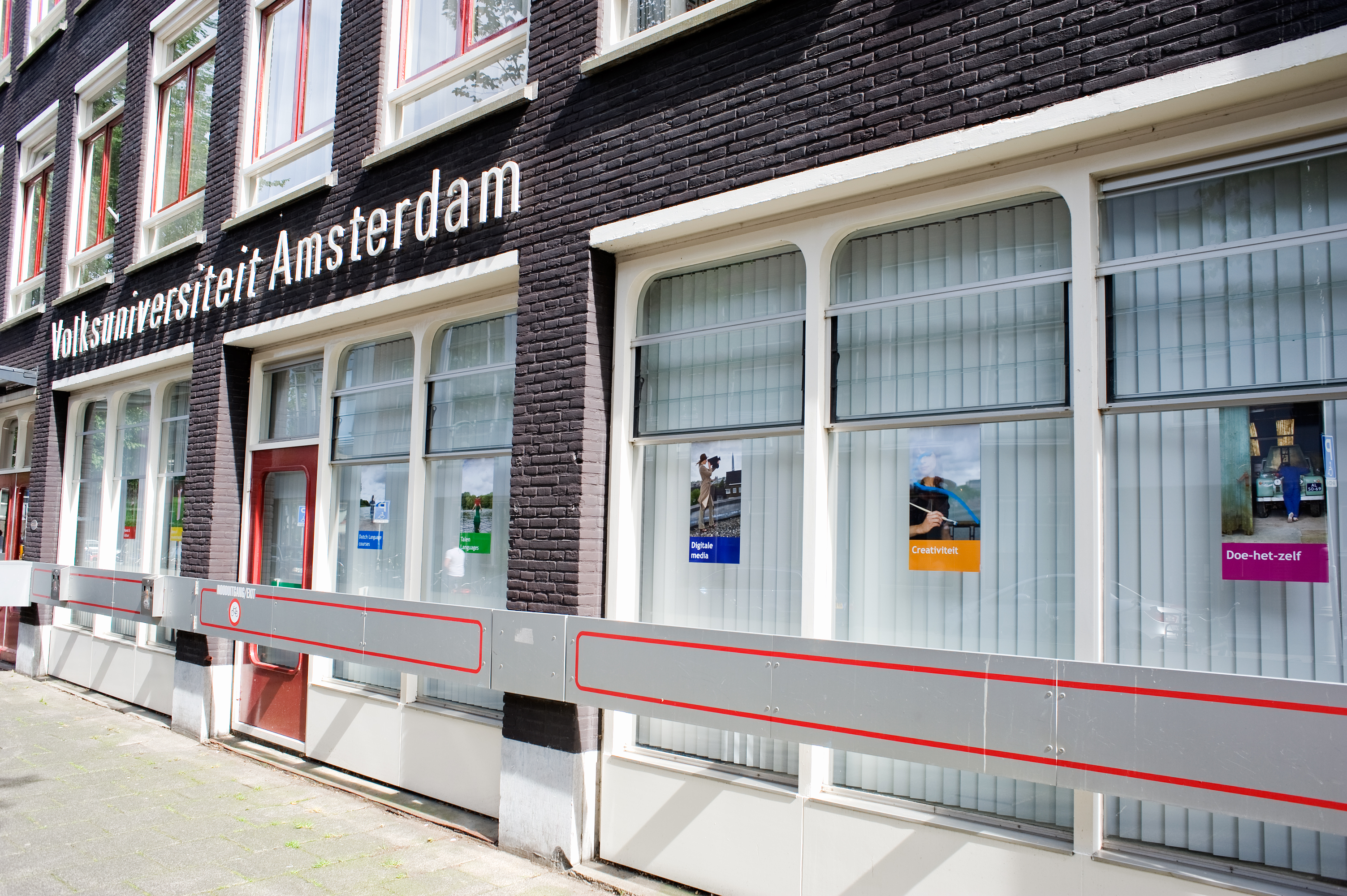 Volksuniversiteit anno 2015